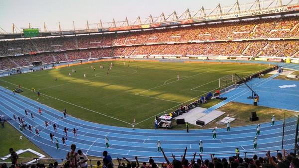 Estadio